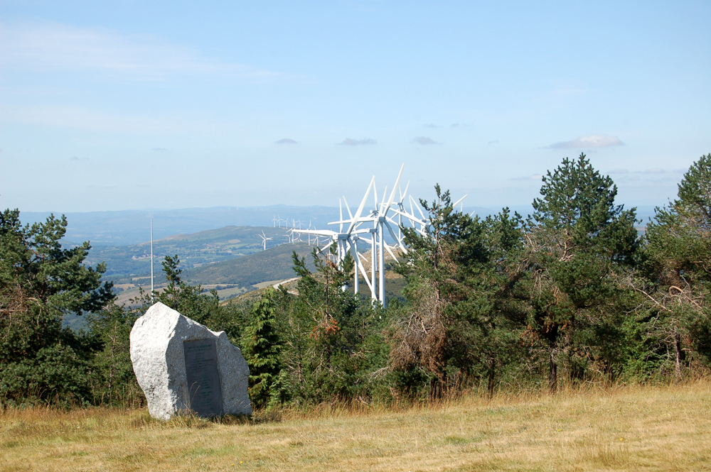 Monolito con poema de Xohán de Requeixo